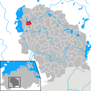 Langen Brütz in Mecklenburg-Vorpommern - District Parchim